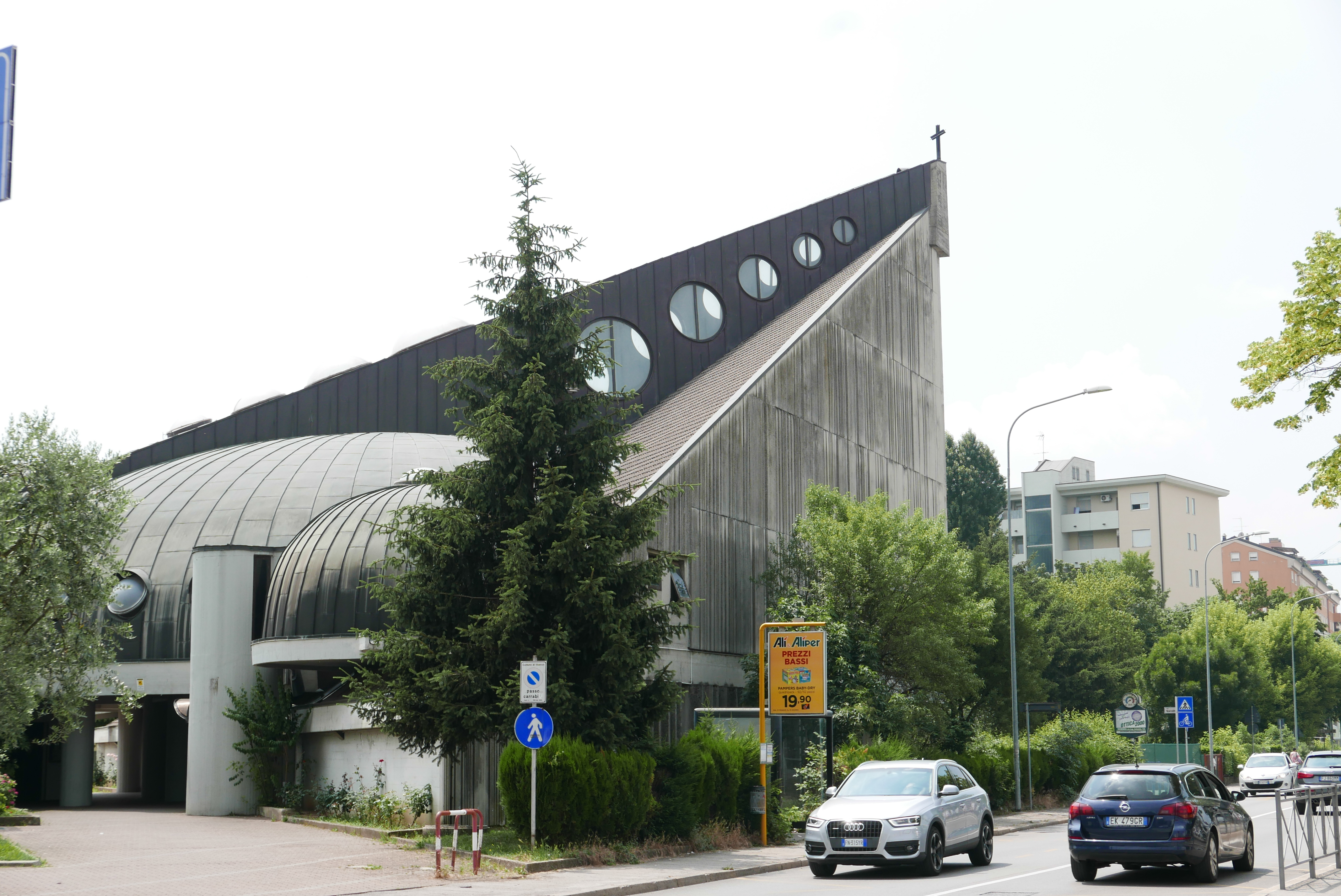 Chiesa di San Giuseppe Lavoratore